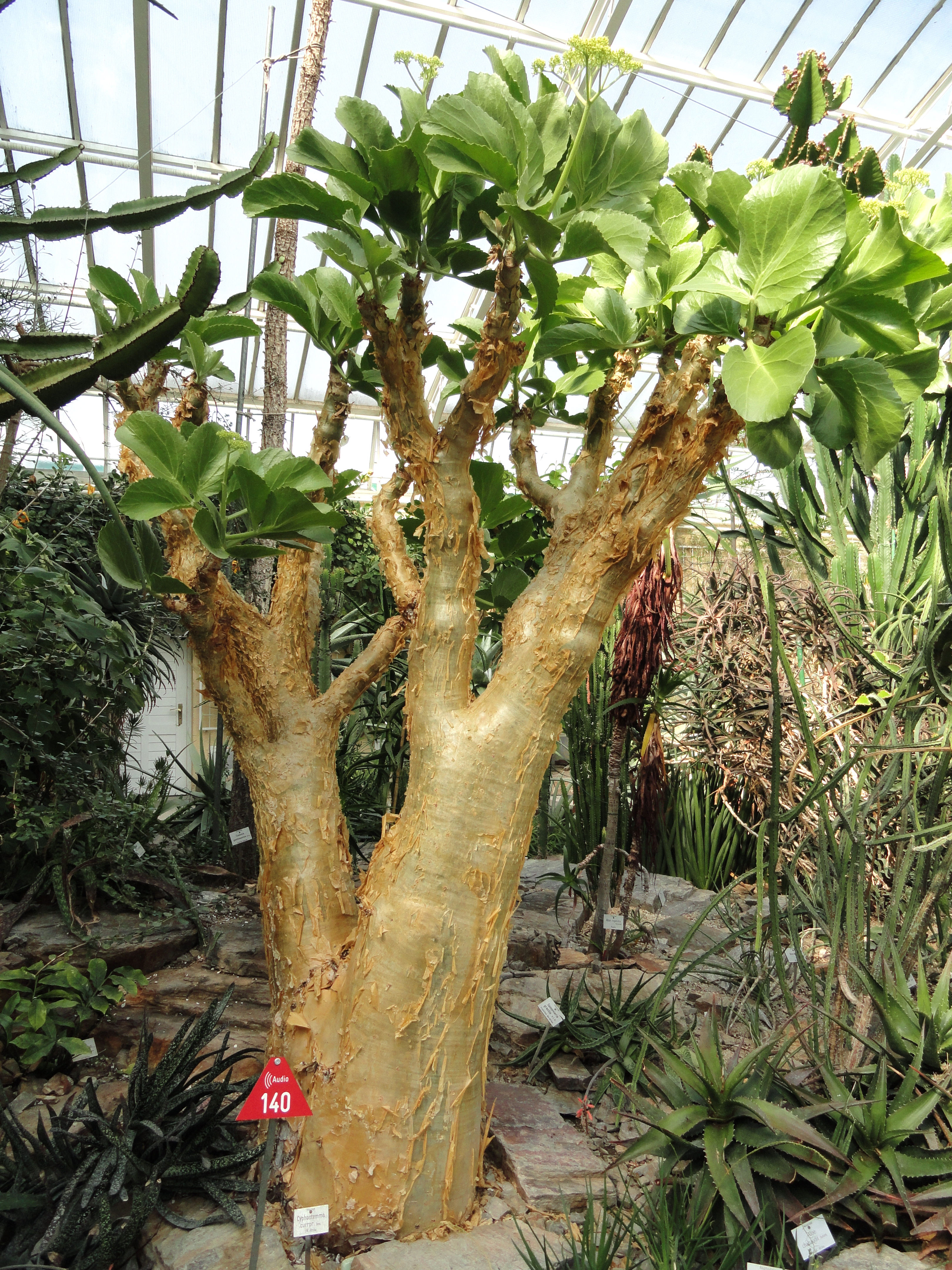 Cyphostemma currorii specimen in the Botanischer Garten München-Nymphenburg, Munich, Germany.